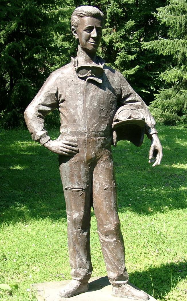 Wolfgang Graf Berghe von Trips, Statue vor der Villa Trips in Kerpen-Horrem